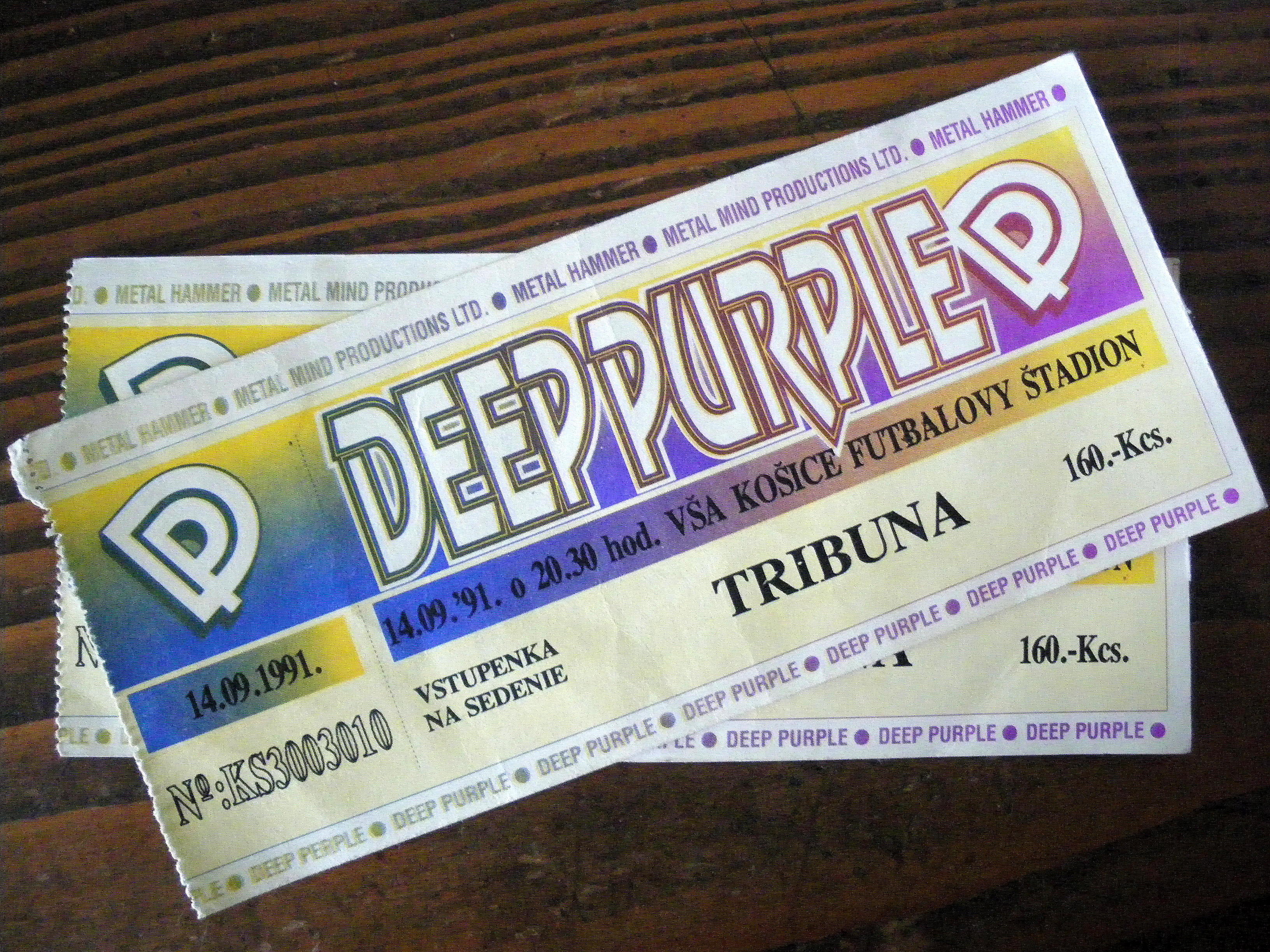 Vstupenky na koncert Deep Purple, 14. septembra 1991 v Košiciach